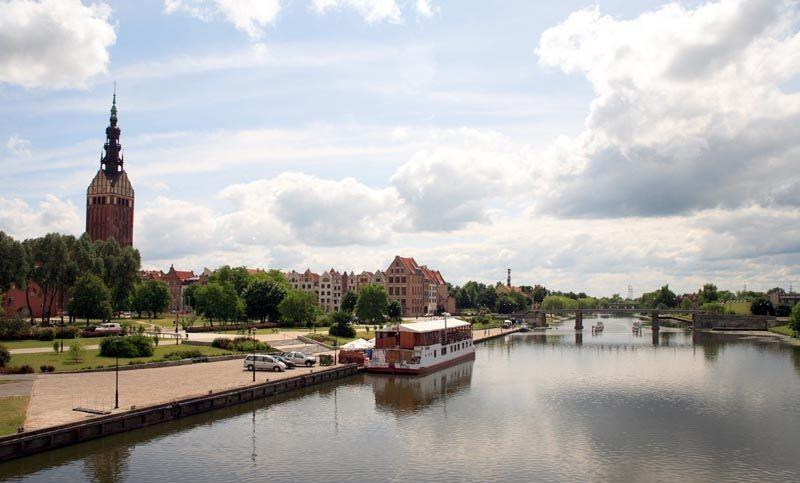 Elbląg